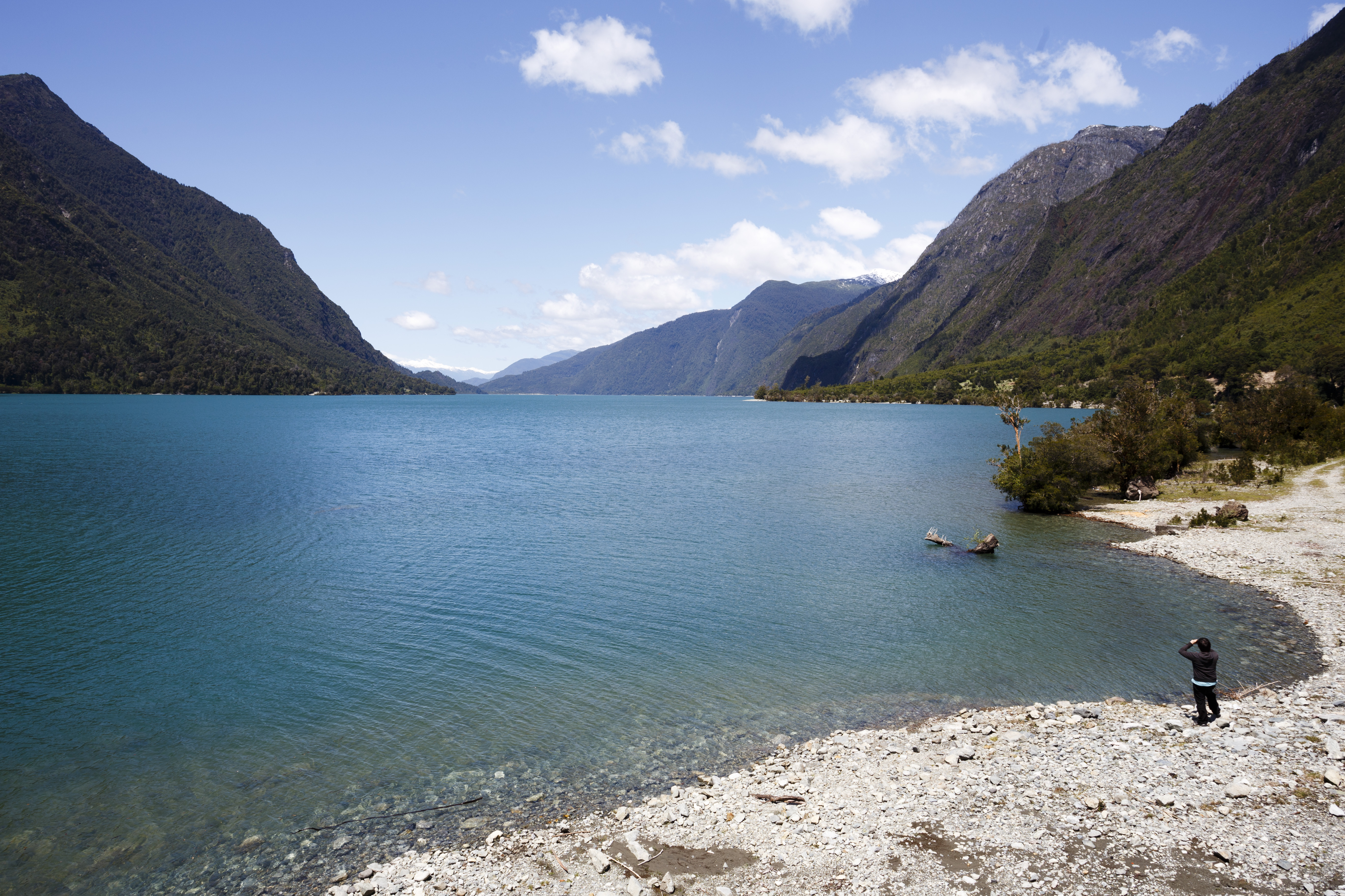 Punta Canelo, lago Tagua Tagua, Cochamó, Chile.